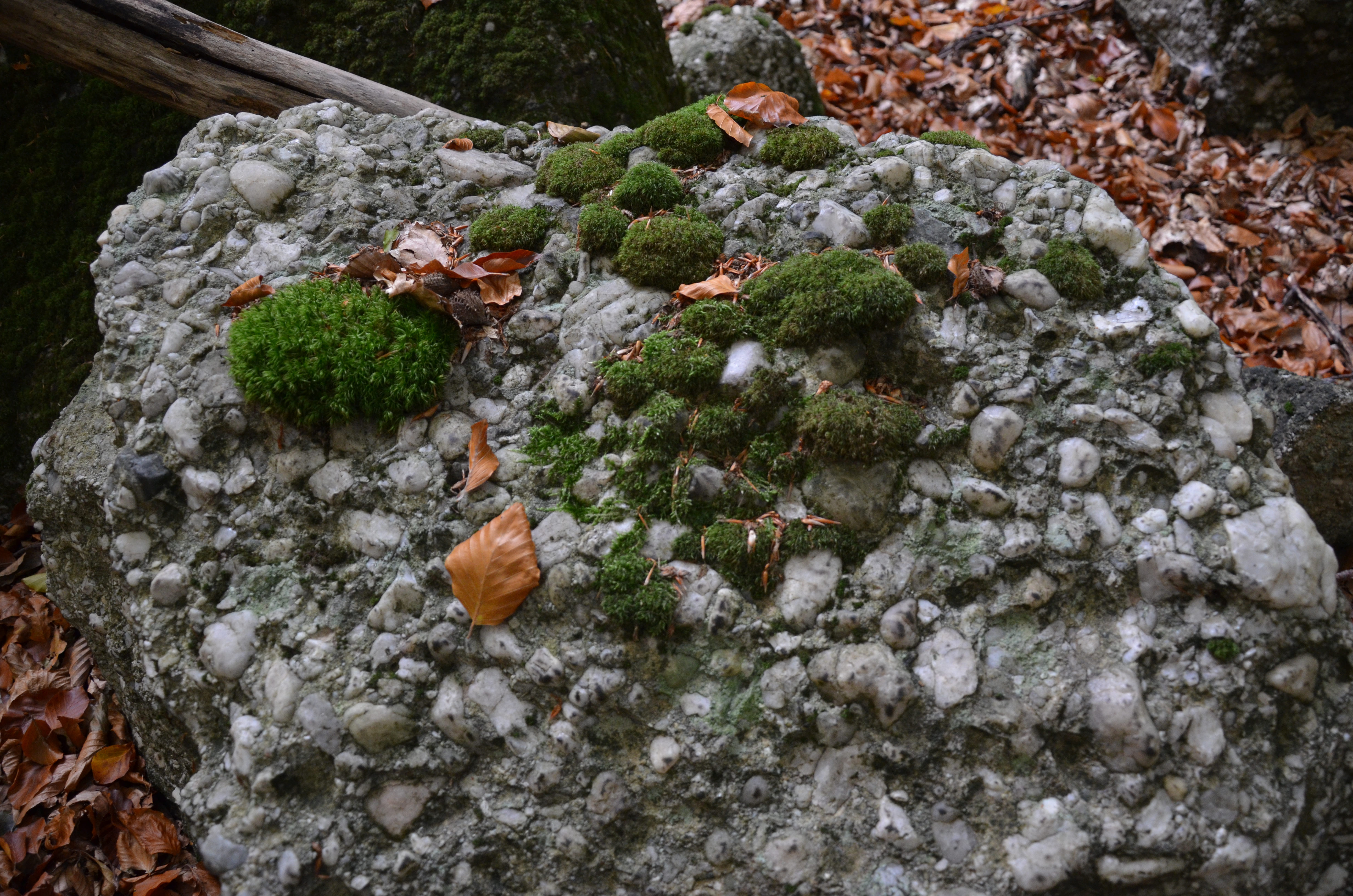 Slepencový balvan v PR Kamenná hůra